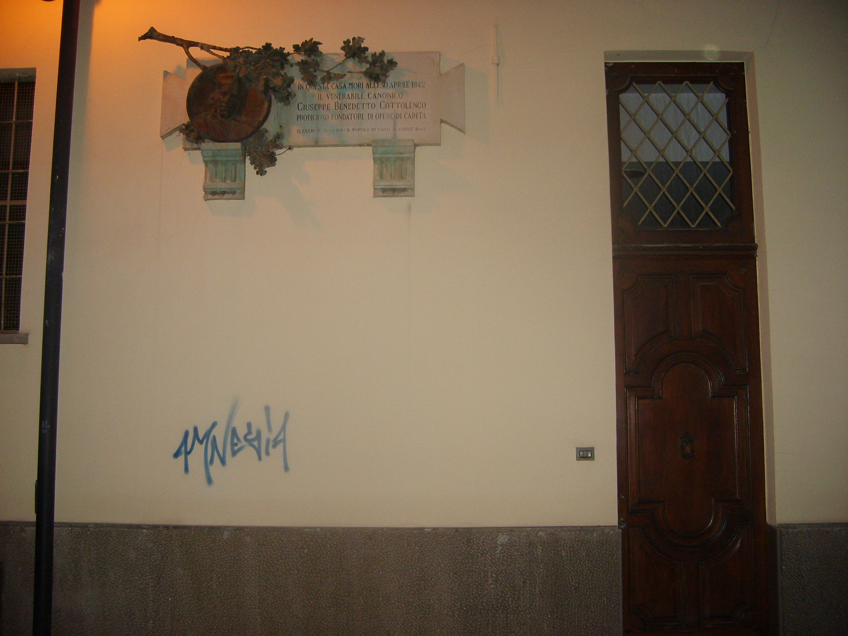 la casa in cui morì Giuseppe Benedetto Cottolengo (Chieri, via Cottolengo)